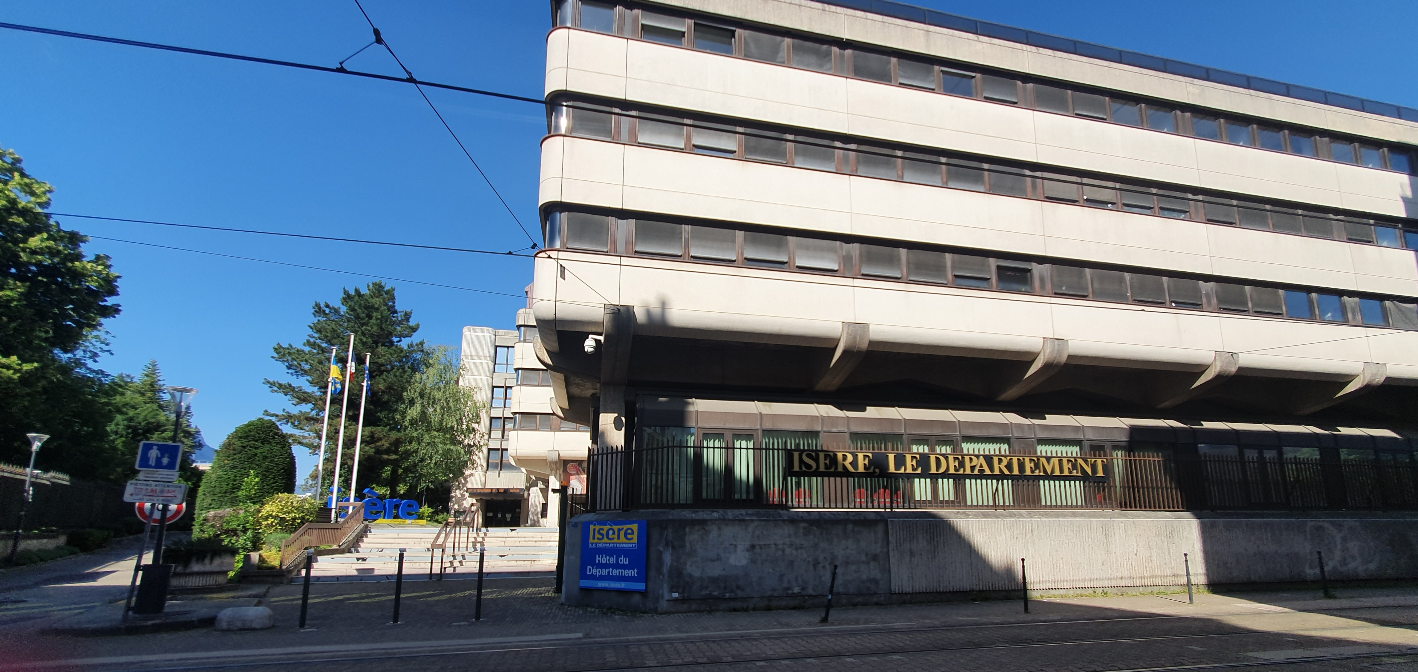 Hôtel du Département de l'Isère avec les lettres dorées sur les grilles "Isère, le Département" au lieu de Conseil général de l'Isère. Sur la gauche, le mot "Isère" écrit en lettres géantes bleu accueillent les visiteurs.